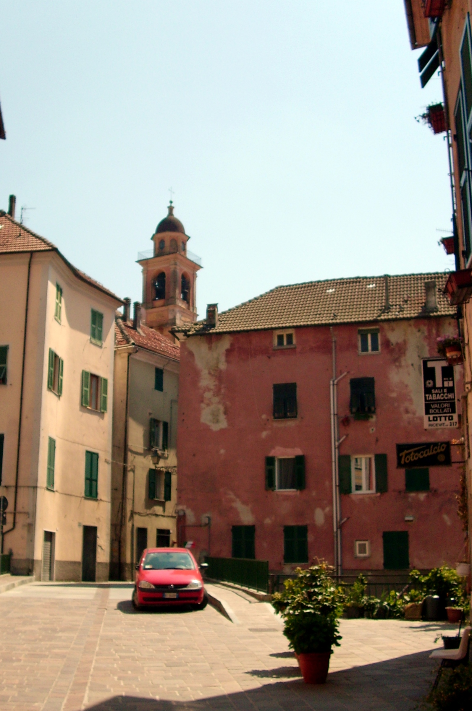 Centro storico di Campo Ligure, Liguria, Italia